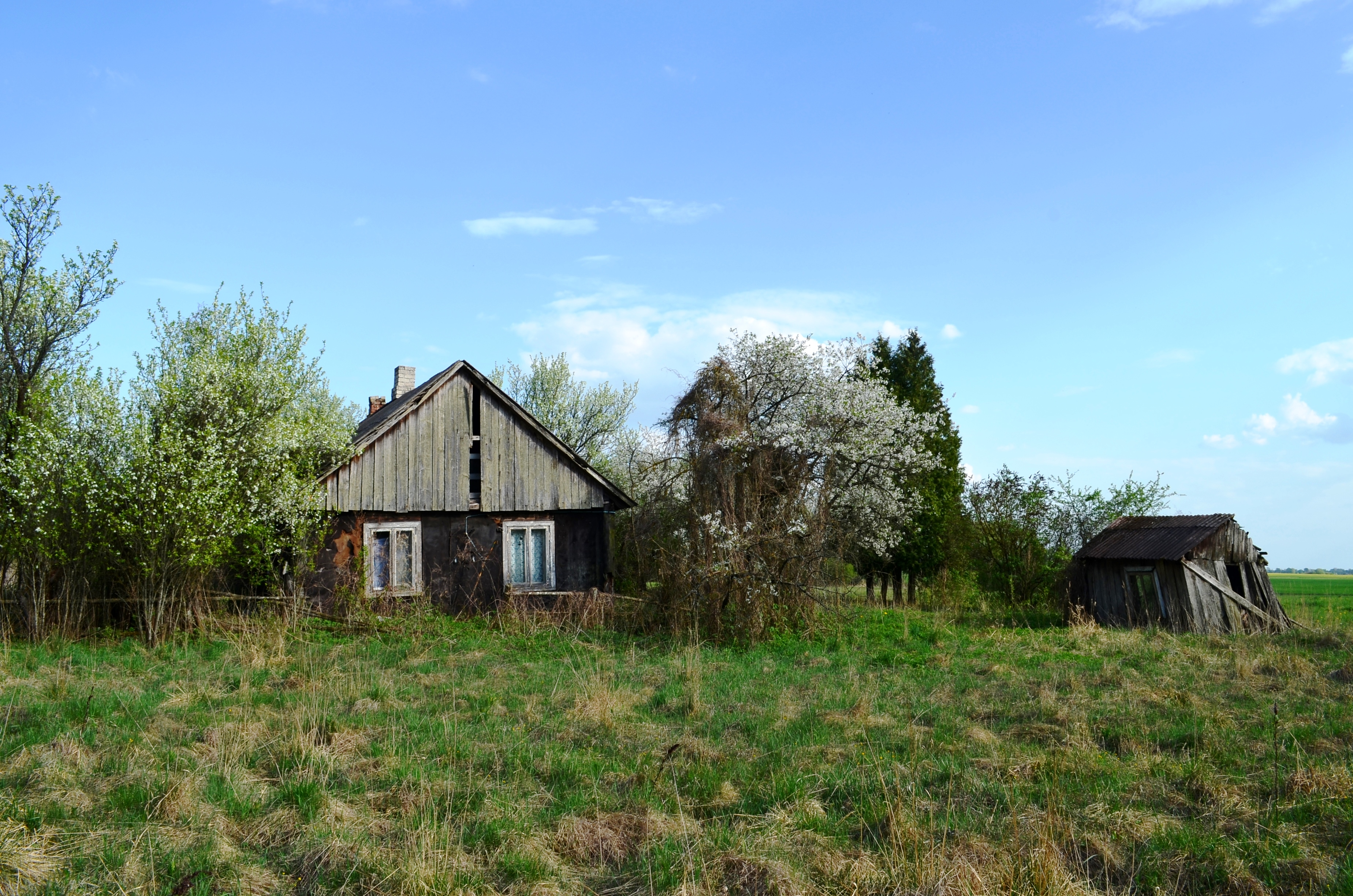 Čiukiškių kaimo sodyba, Kėdainių raj.